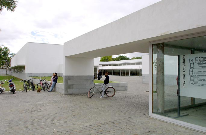 Distrito Sur, Rosario. Obra del Arq. Alvaro Siza